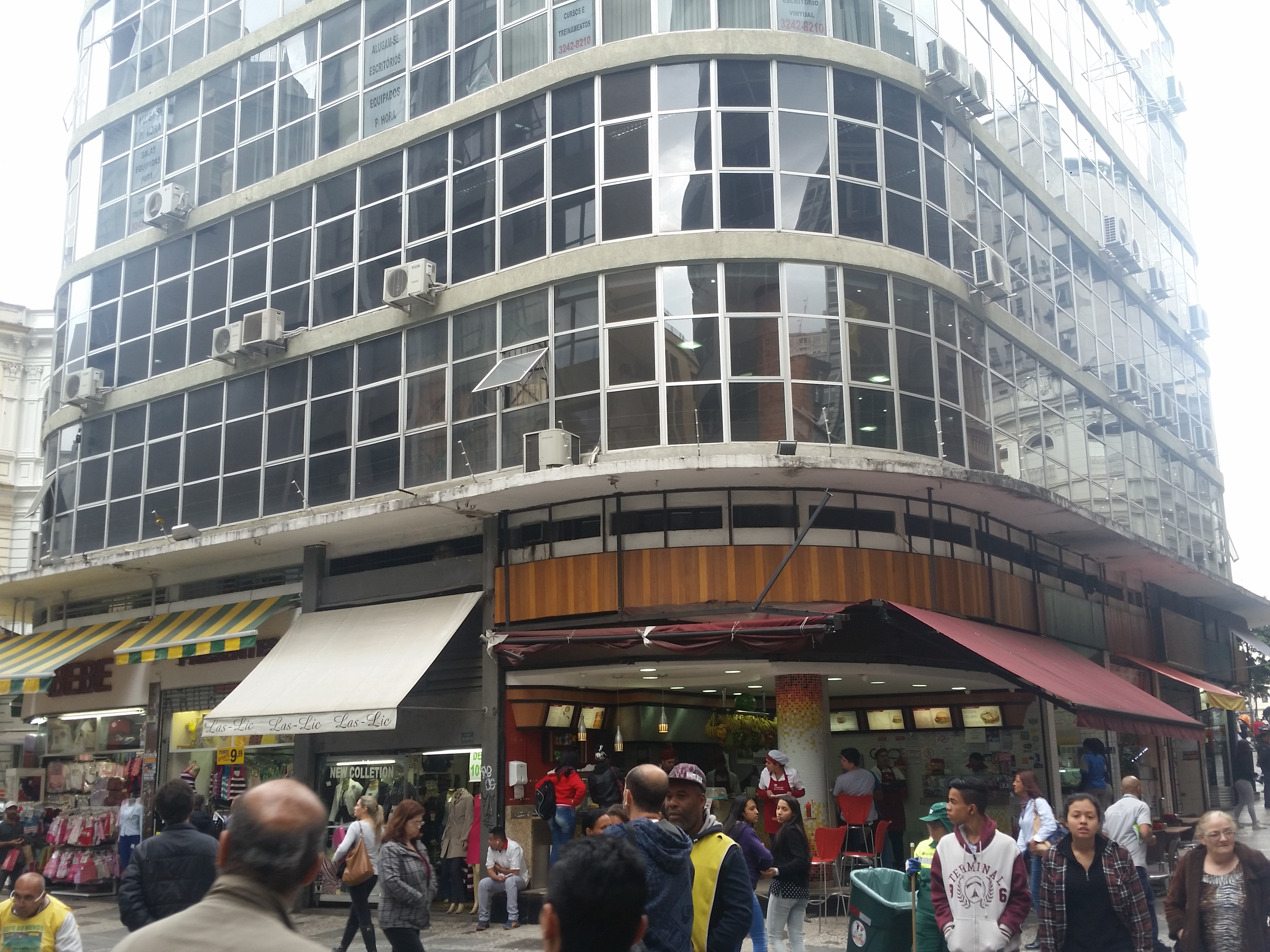 Comércios na parte inferior do Edifício Triângulo, em São Paulo (SP), Brasil